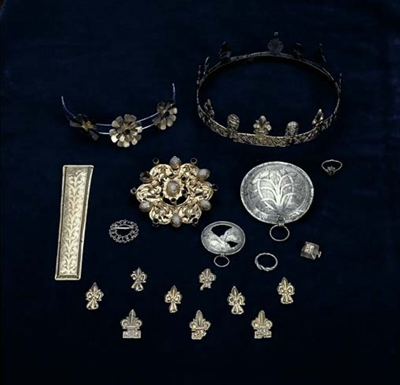 Badebodaskatten